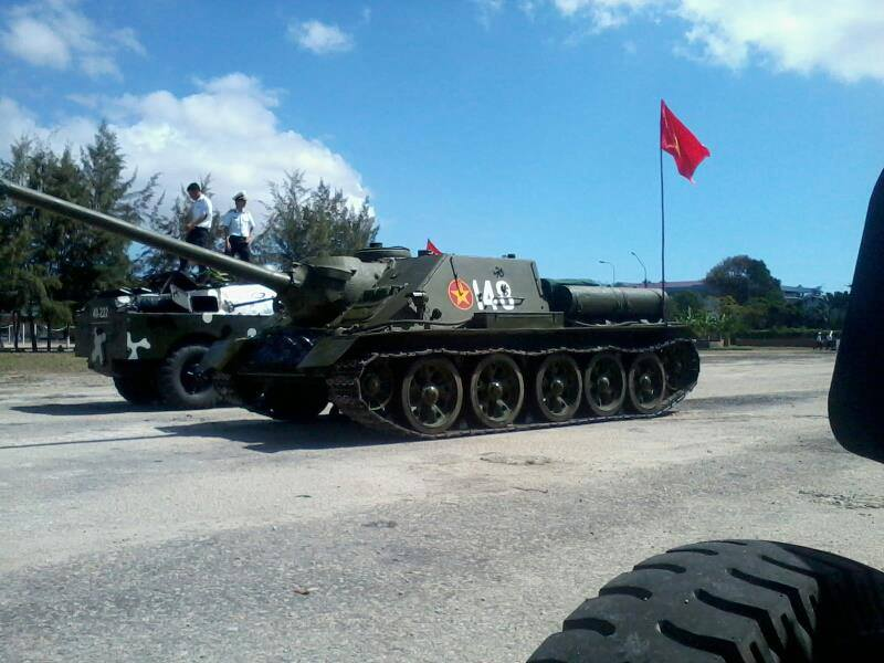 Pháo tự hành SU-100